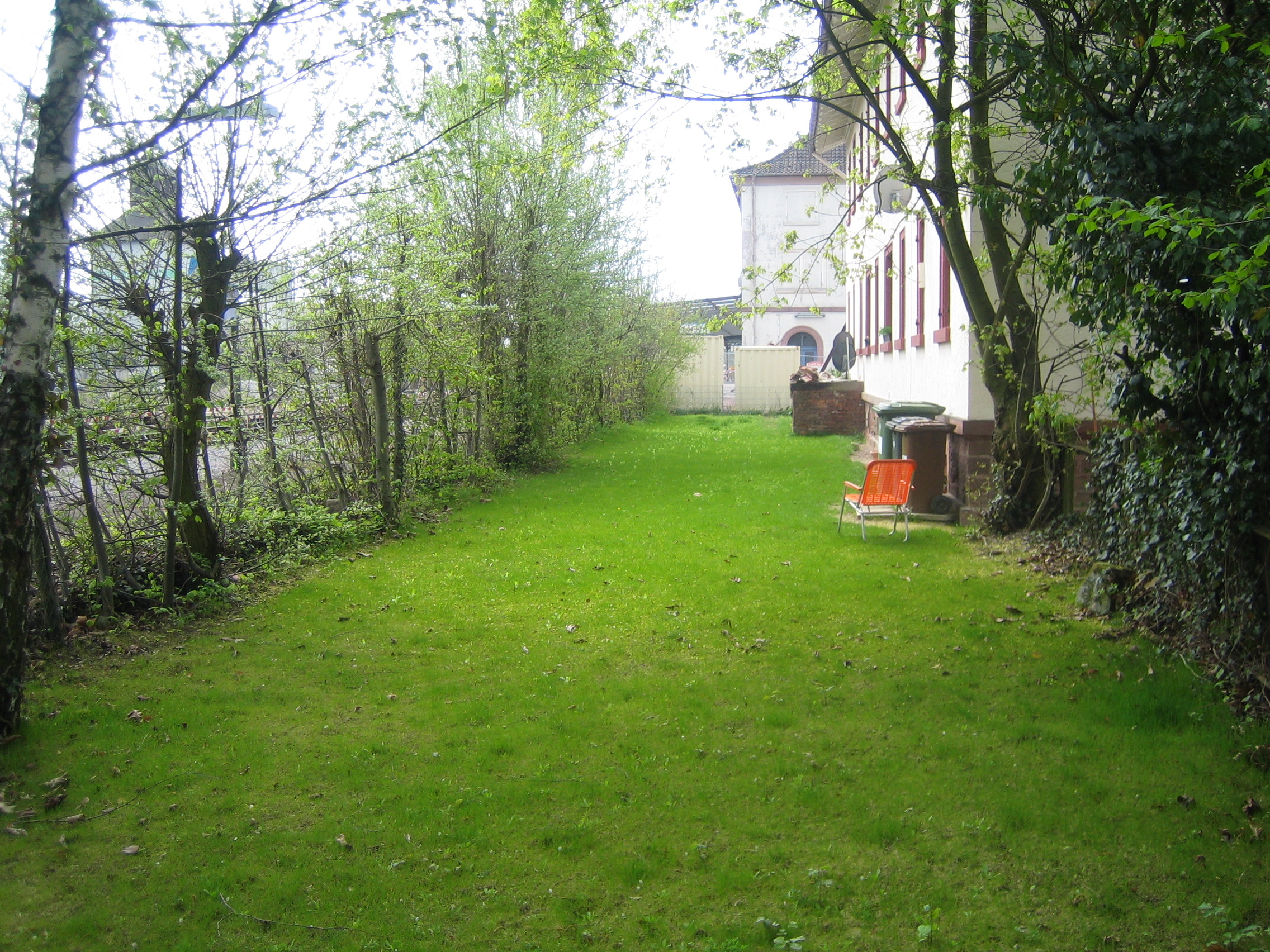 Ex-Gleis 1a im Bahnhof Winden